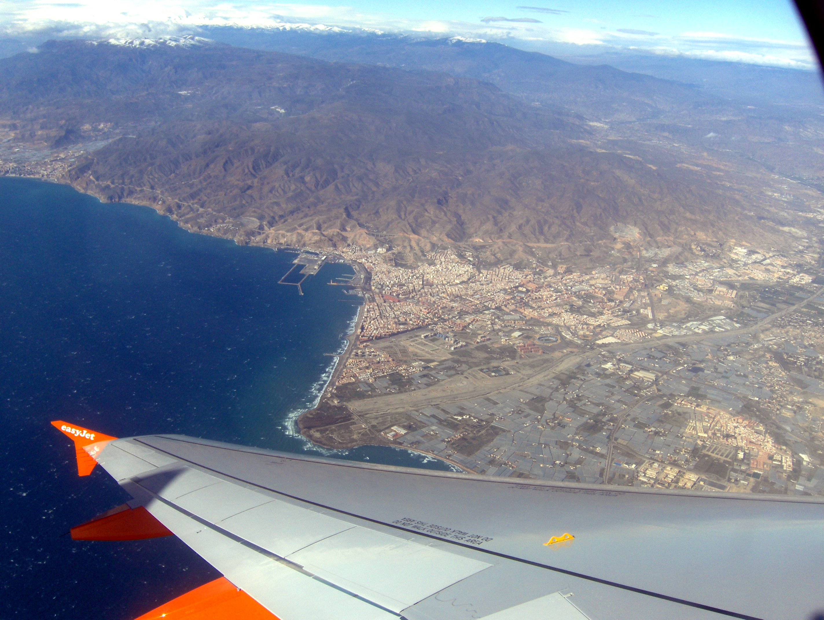 Almería desde el aire